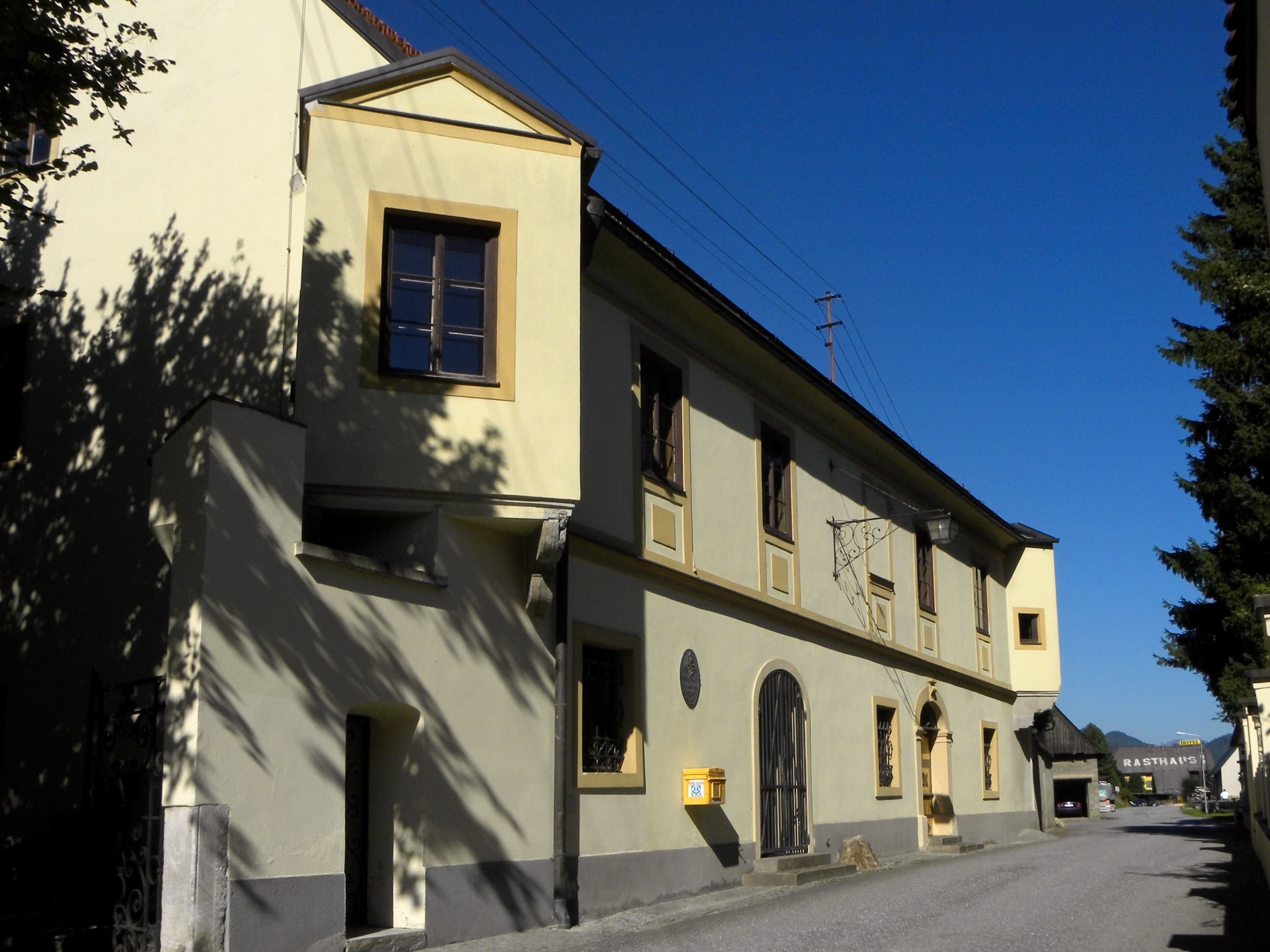 Schloss Rothenthurm